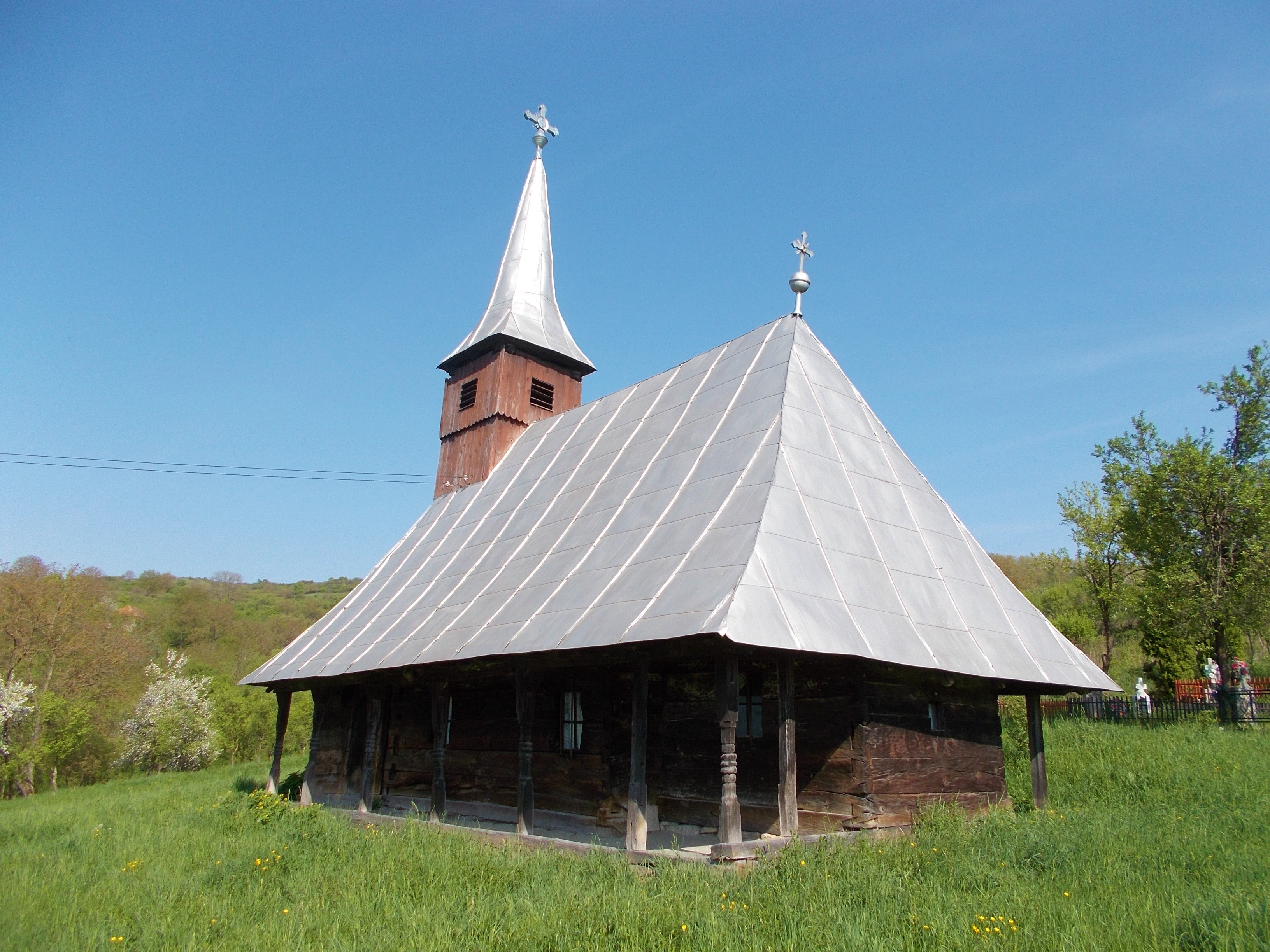 Biserica de lemn din Turbuţa